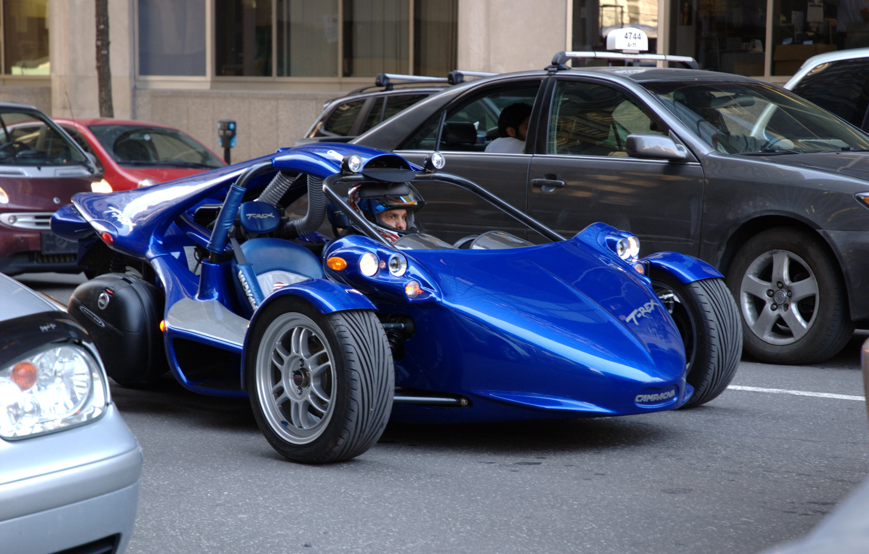 Campagna T-Rex est un 2-places, 3-roues moto qui combine l'aspect et la manipulation d'une voiture avec l'économie de carburant d'une moto, créée par le Canadien auto / moto Corporation Campagna constructeur situé au Québec. L'utilisation d'un 1,4 l, 4-cylindres, il accélère de 0 à 97 km / h (0-60 mph) en 3,5 secondes, avec vitesse de pointe de 252,66 kmh (157 mph). Bien que classé comme une motocyclette, l'intérieur peut accueillir deux passagers côte-à-latérales, avec des dos de votre choix avant réglables, pied-pédale boîtes et les autres 3-point ceintures de sécurité rétractables. La transmission manuelle, bien contrôlé par la main, ressemble davantage à la transmission de moto que celle d'une voiture.